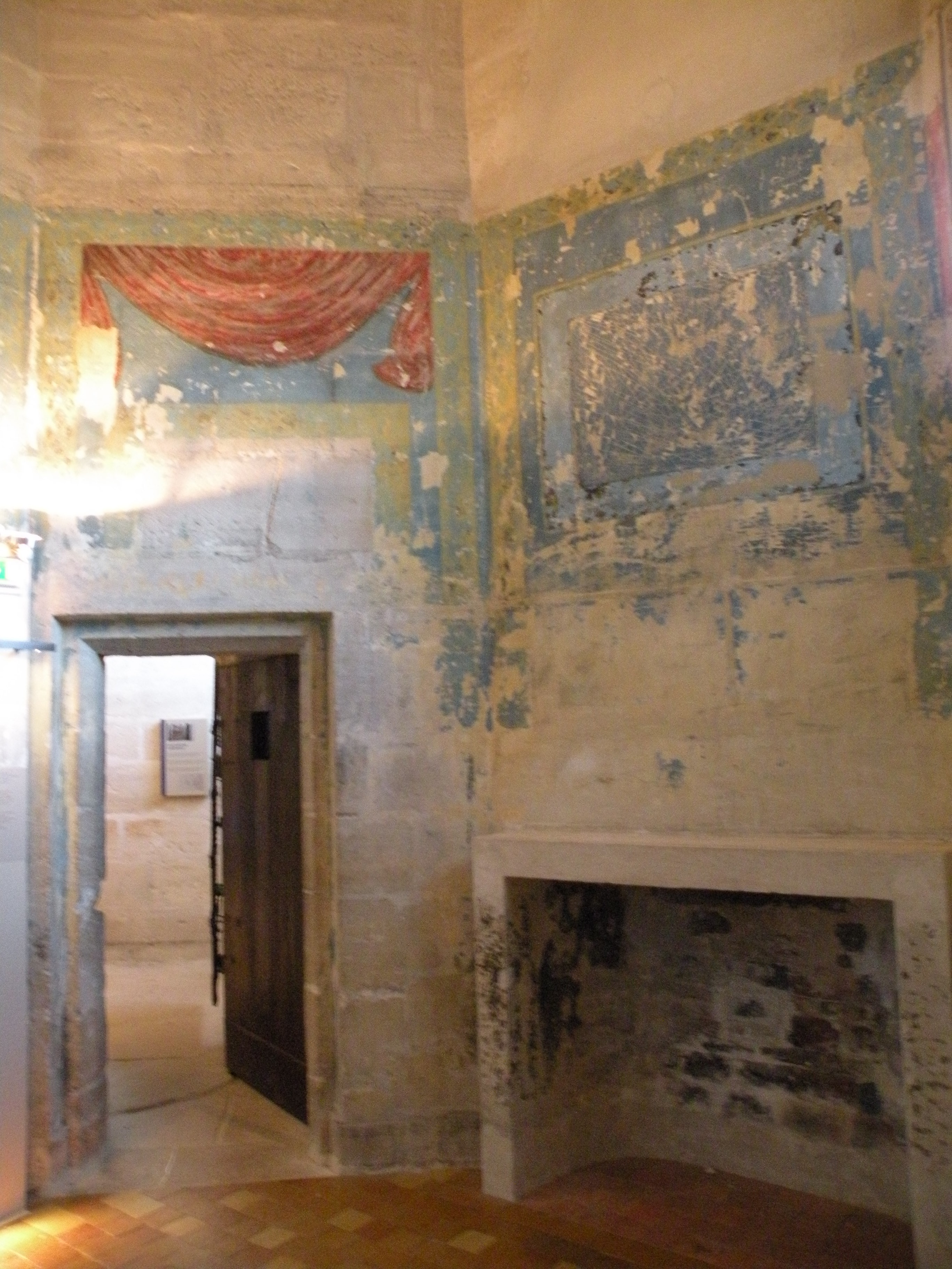 Cellule de monseigneur Boulogne chateau de vincennes